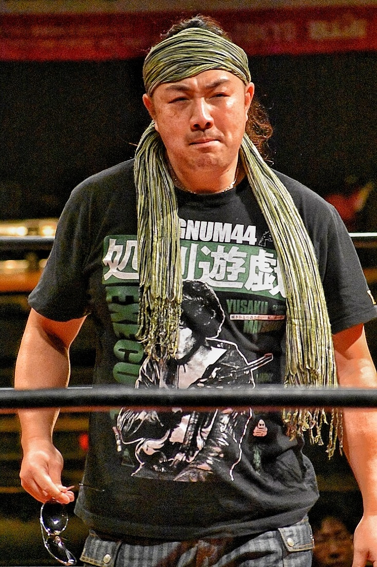 プロレスラー藤原秀旺